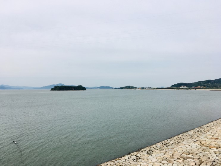 인천 서해 바다